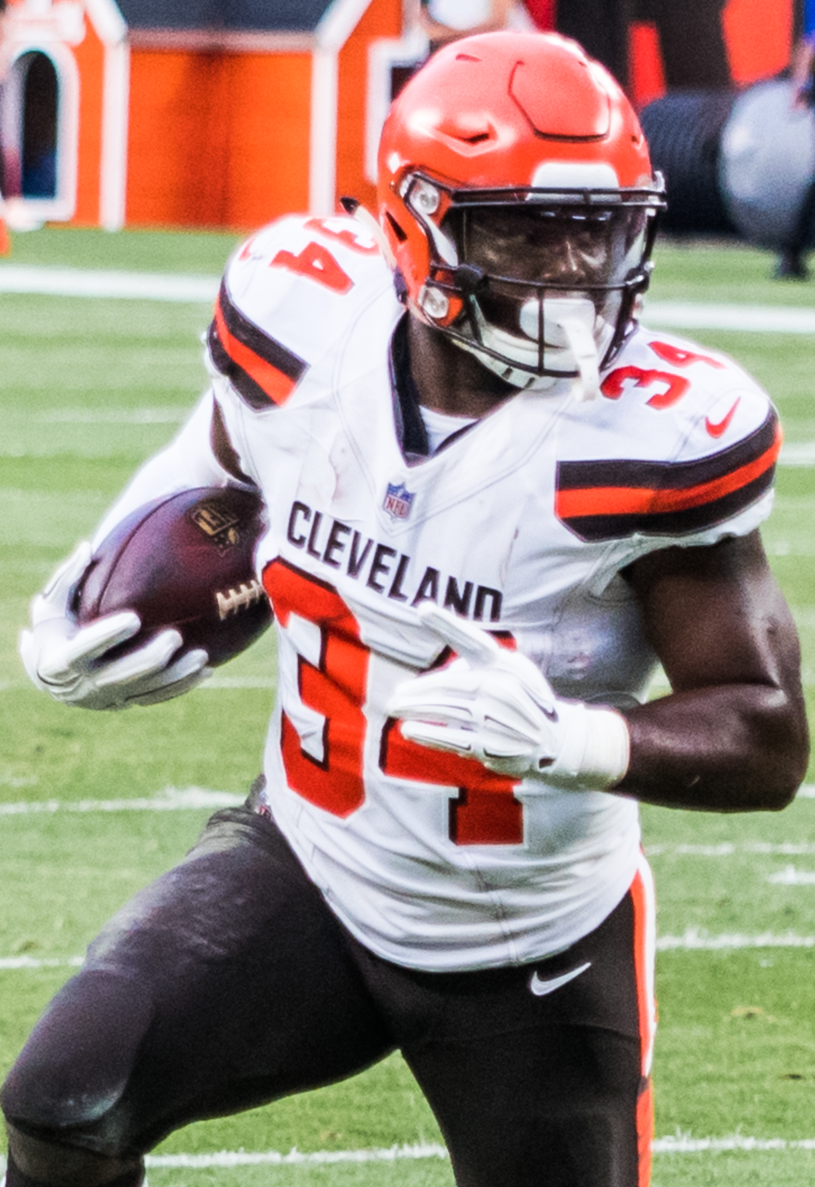 Carlos Hyde